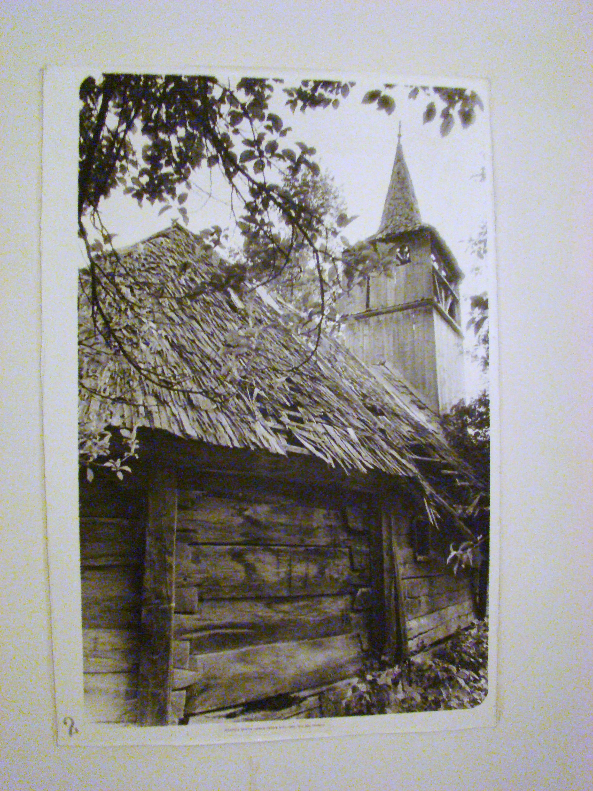 Biserica de lemn din Mintia, Hunedoara, mutată în incinta Muzeului Țăranului Român din București